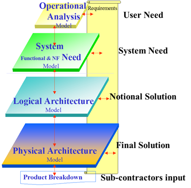 Phases d'ingénierie ARCADIA